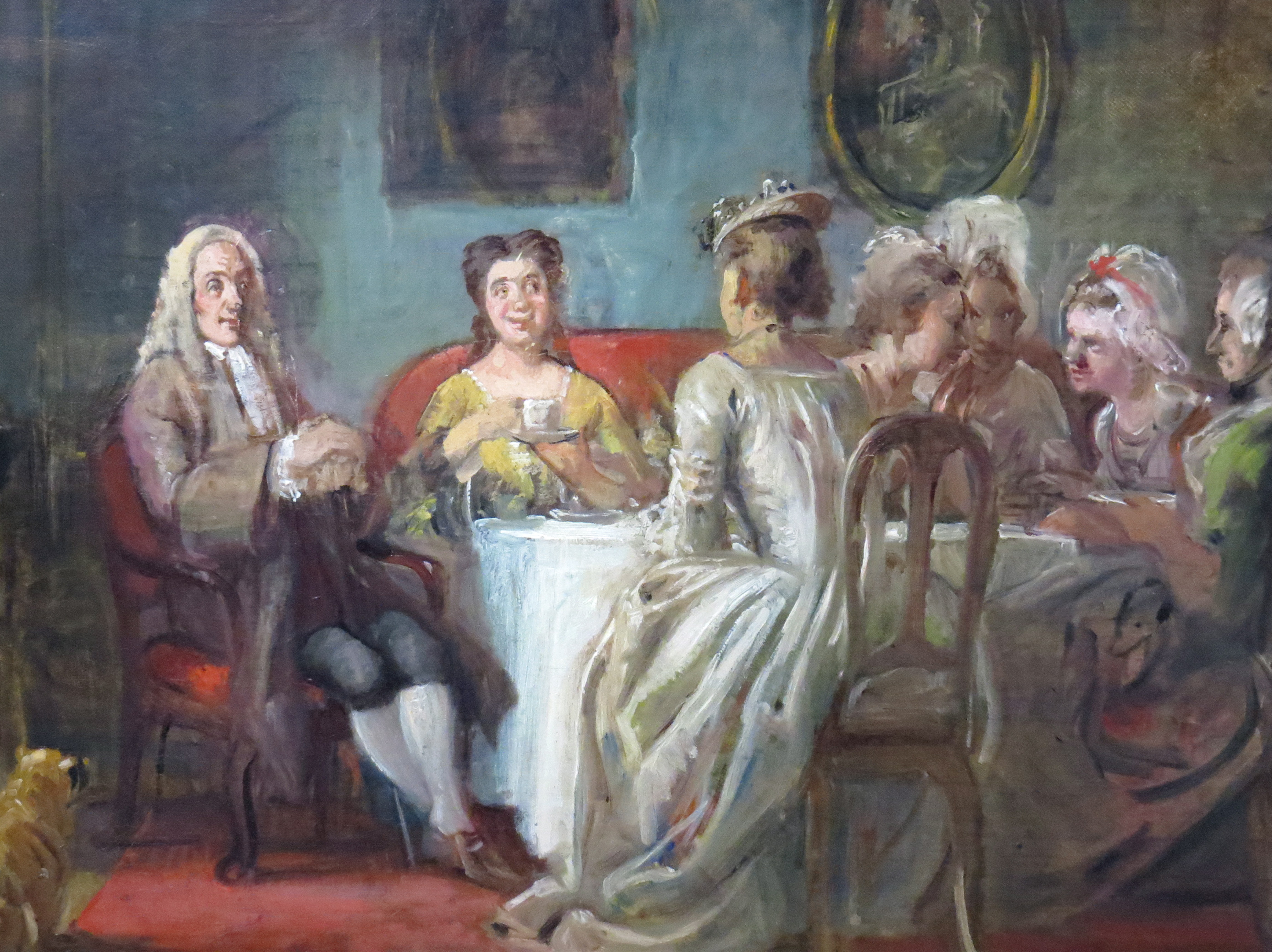 Udsnit af Holberg i kaffeselskab hos madame N.N., maleri fra ca. 1866 av Wilhelm Marstrand (1810-1873], Den Hirschsprungske Samling, København